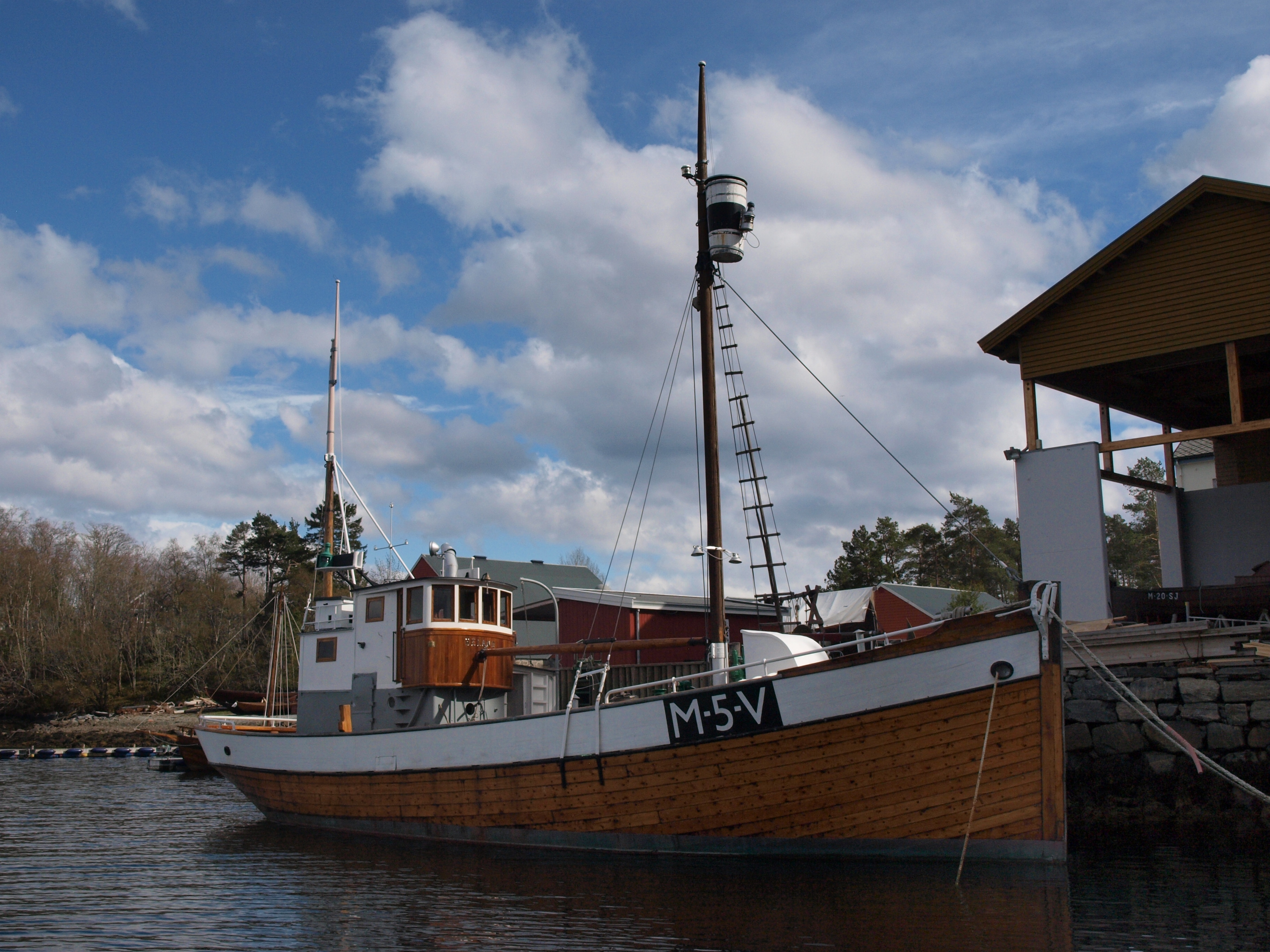 MK «Heland» ,Sunnmøre Museum, Ålesund, Norway